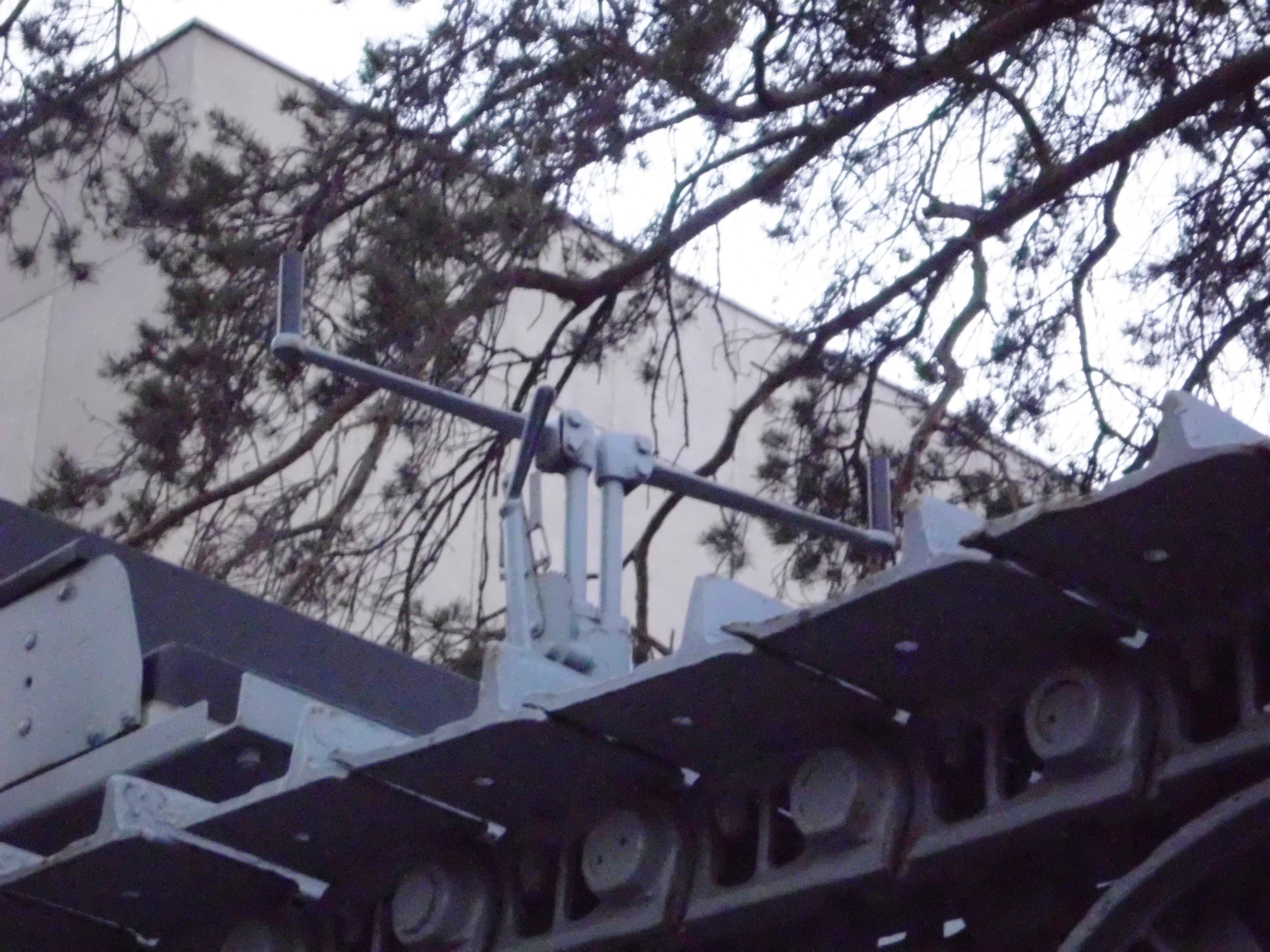 Памятник «Первенец ЧТЗ - трактор С-60»: проспект Ленина, 3 (перед зданием заводоуправления), город Челябинск, Челябинская область.